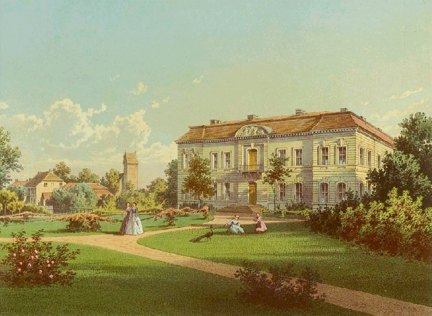 Castle of Kossenblatt, Schloss Kossenblatt, Kreis Beeskow-Storkow, Provinz Brandenburg